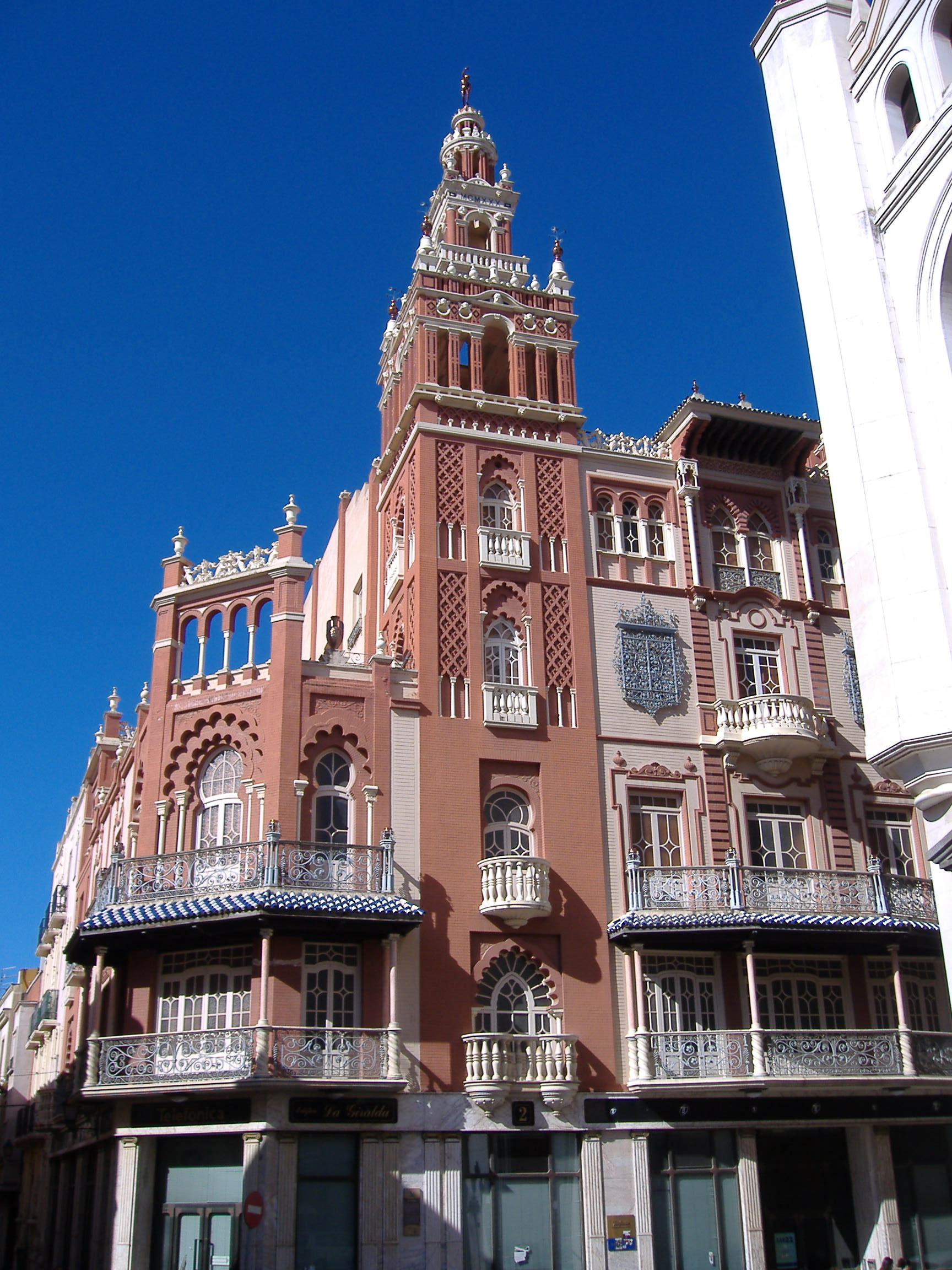 La Giraldilla de Badajoz. Edificio emblemático de la ciudad.